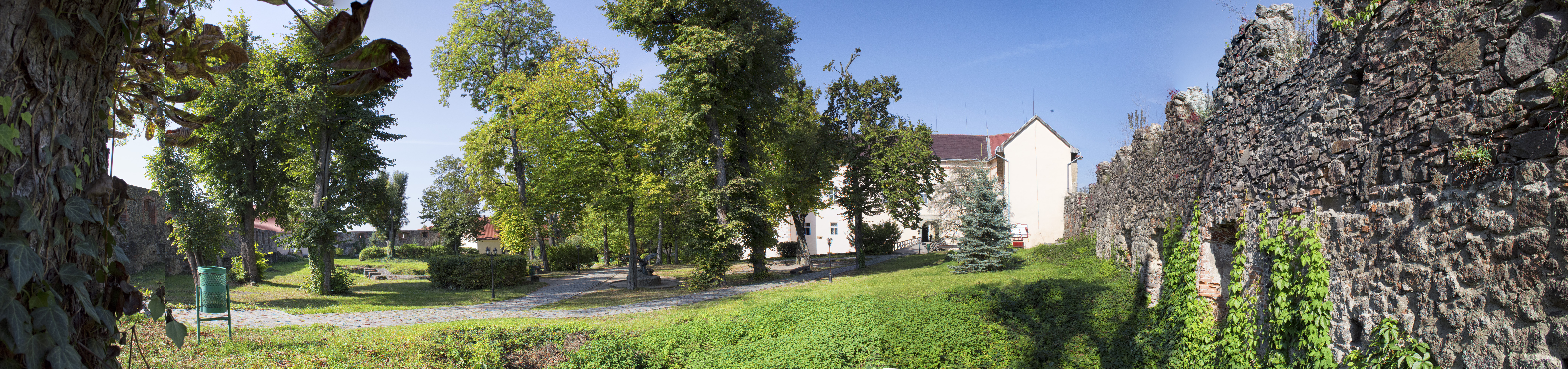 Замок-фортеця (мур.), Ужгород, вул.Капітульна, 33